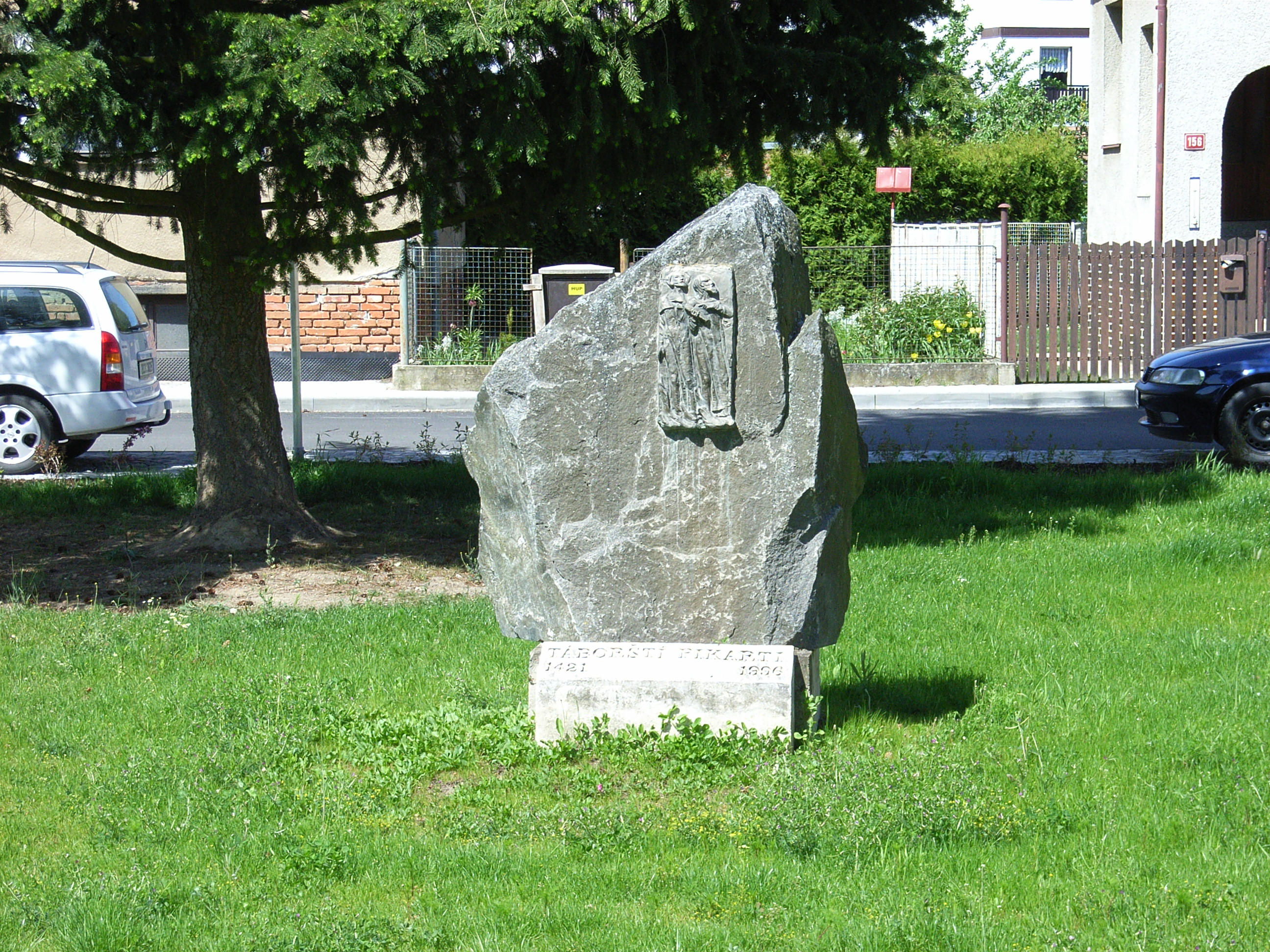 Klokoty-náves-pomníček/pikarti